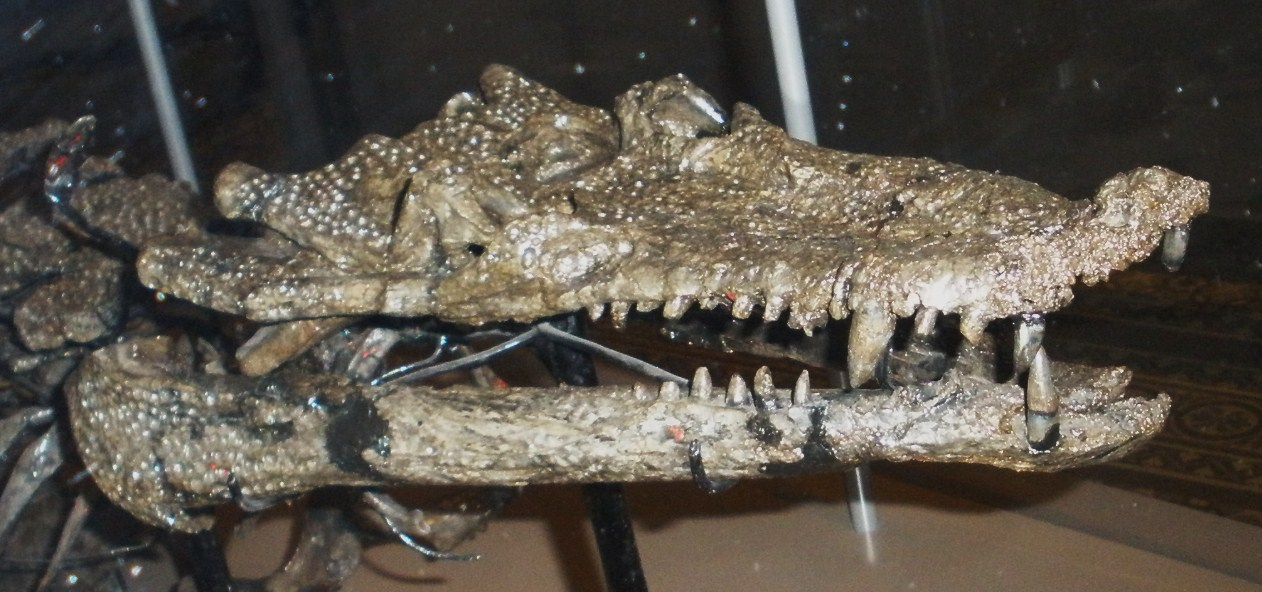 Fossil of Goniopholis, an extinct crocodile Took the photo at Musee d'Histoire Naturelle, Brussels